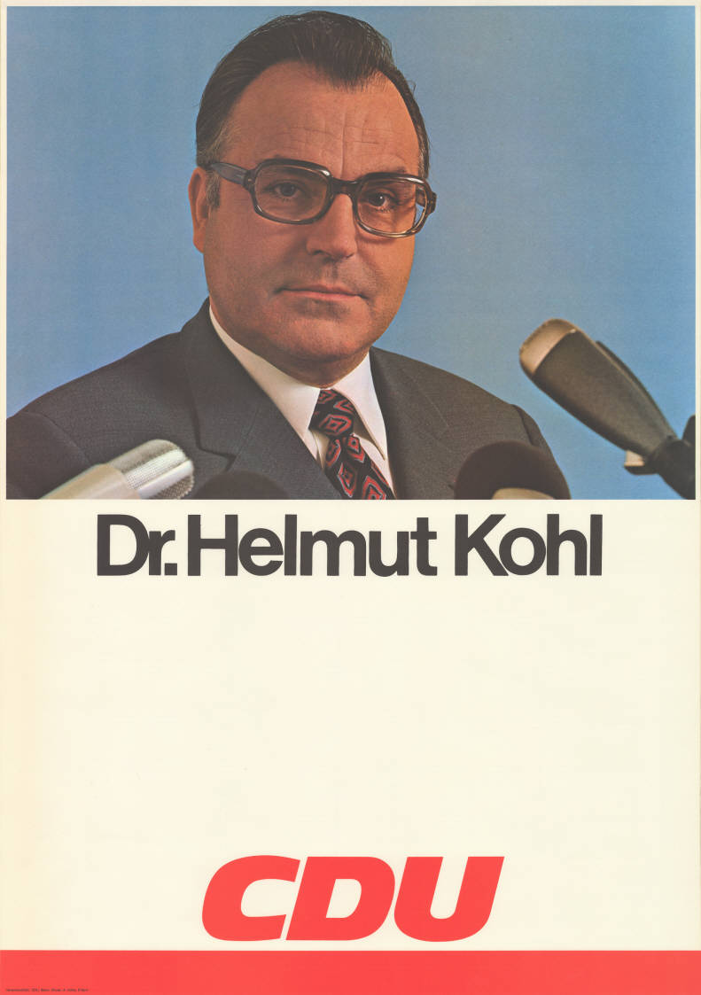 Dr. Helmut Kohl CDU Abbildung: Porträtfoto Plakatart: Kandidaten-/Personenplakat mit Porträt Auftraggeber: Verantw.: CDU, Bonn Drucker_Druckart_Druckort: Alfried Holle, Düsseldorf Objekt-Signatur: 10-009 : 715 Bestand: Landtagswahlplakate Nordrhein-Westfalen (10-009) GliederungBestand10-18: Landtagswahlplakate Nordrhein-Westfalen (10-009) » CDU Lizenz: KAS/ACDP 10-009 : 715 CC-BY-SA 3.0 DE